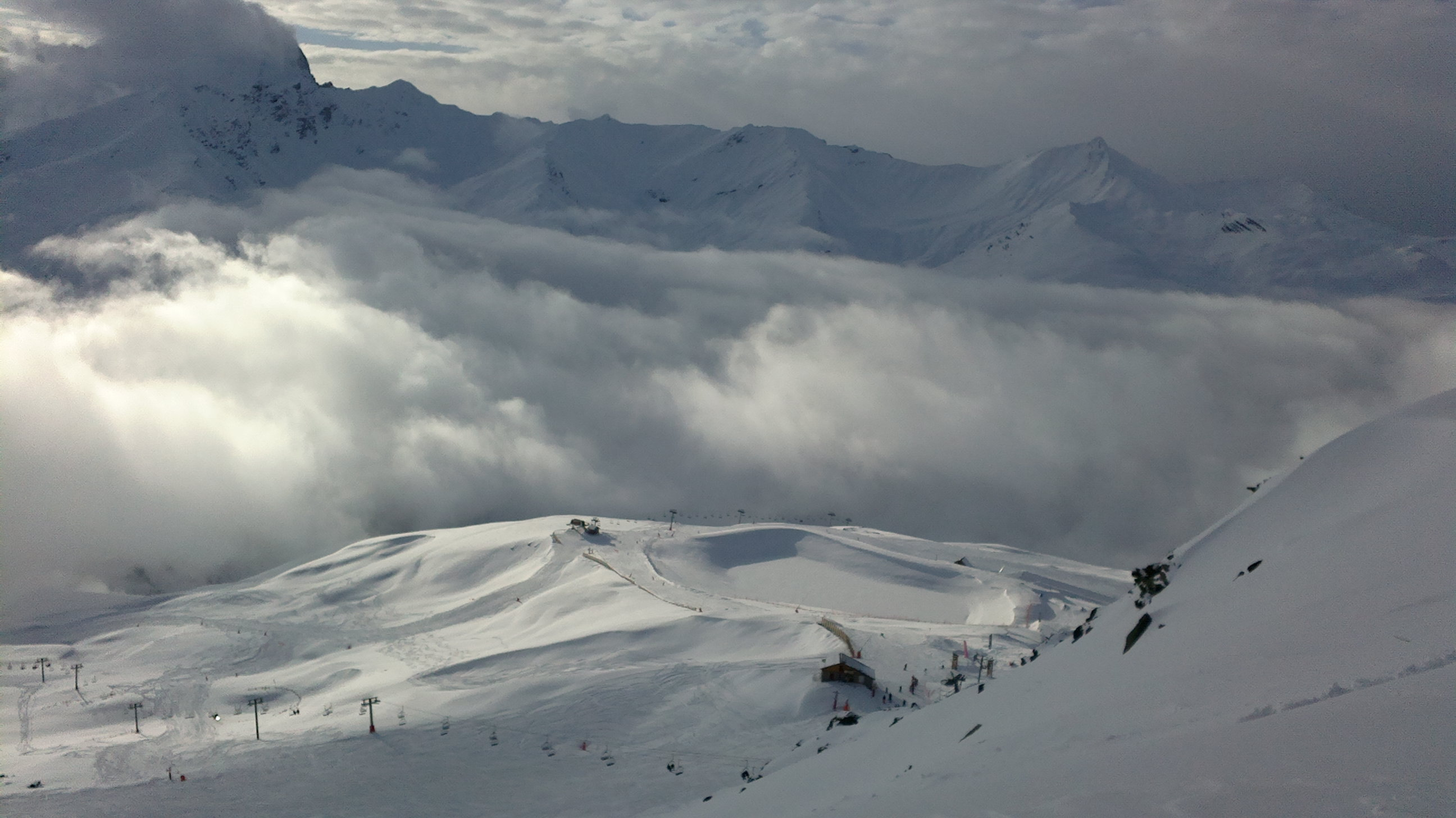 Le lac de la Vieille et l'arrivée du télésiège du même nom. TSF Colérieux visible, ainsi que l'arrivée du TK Ripaille.